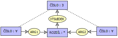 Funkční závislosti - konceptuální graf.